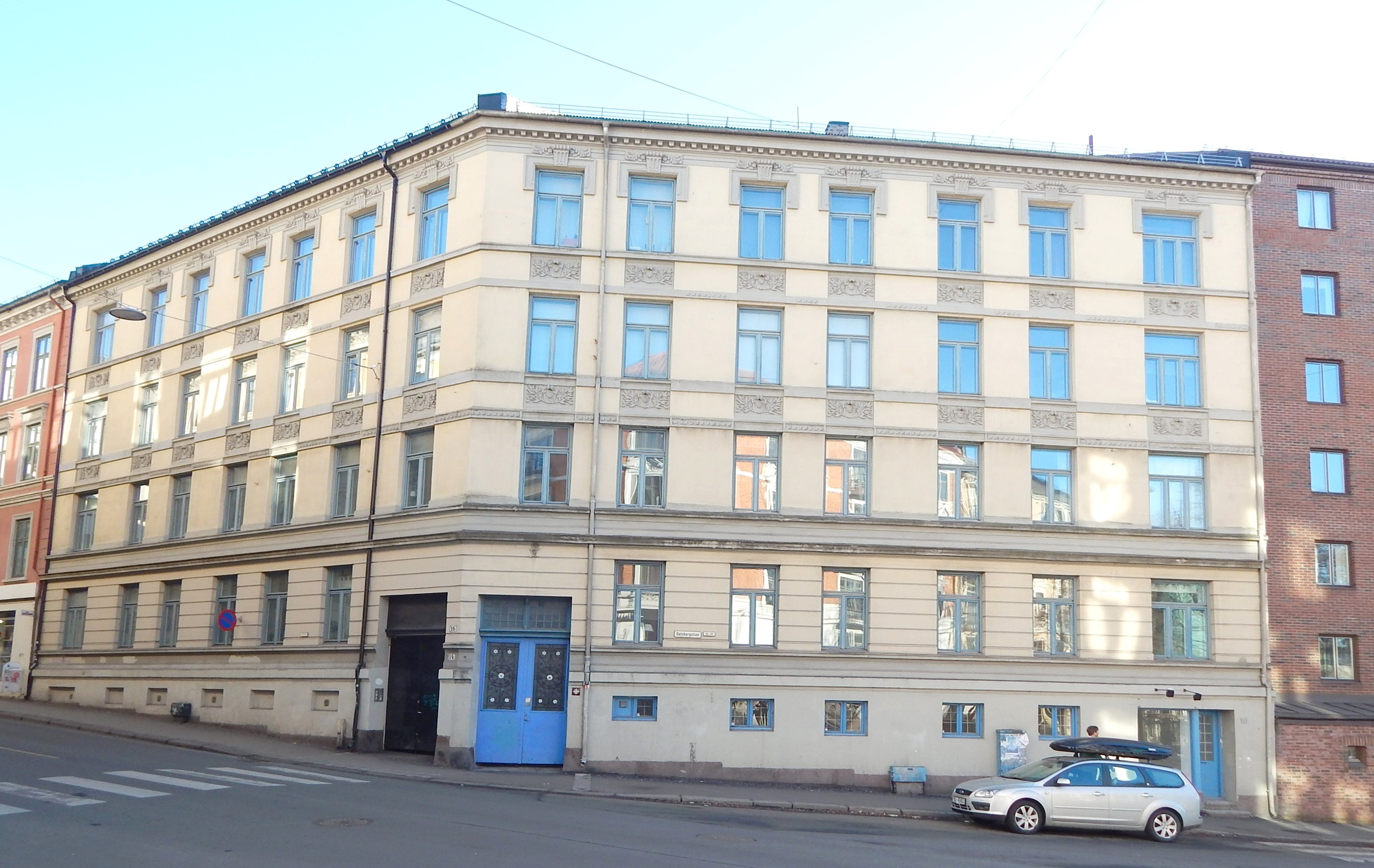 Dalsbergstien 14–16